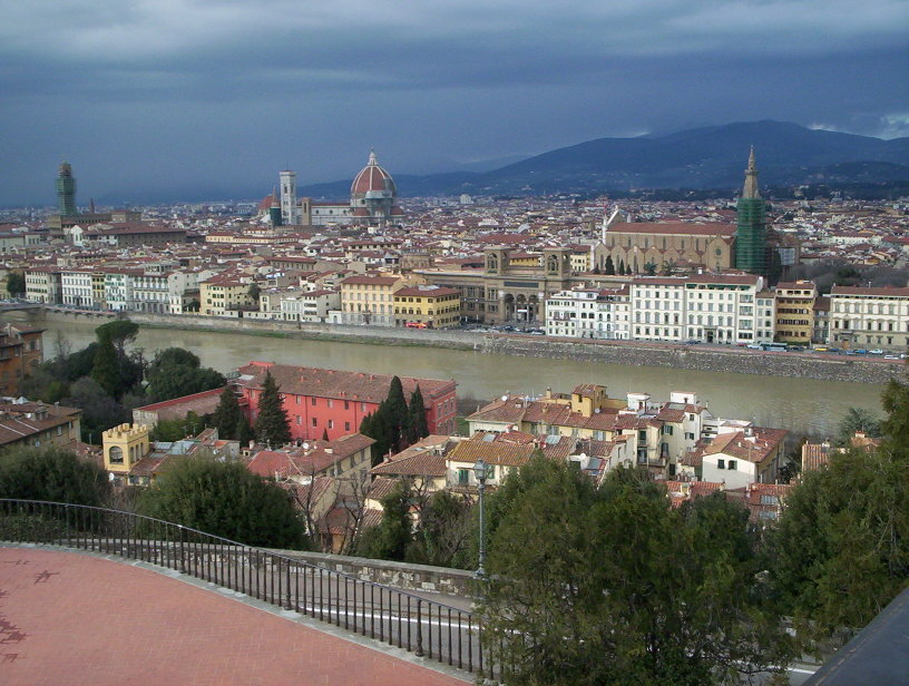 Firenze.